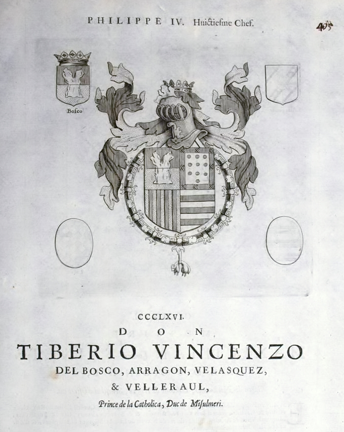 Blasone del 366. brevetto dell'Ordine Toson d'Oro, concesso a Tiberio Vincenzo Ventimiglia del Bosco: Jean Baptiste Maurice, Le Blason des armoires de tous les chevaliers de l'Orddre de la Toison d'Or, depuis la première institution jusques à présent, La Haye, Bruxelles, Anvers: Jean Ramazzeyn, Lucas de Potter, 1667, p. 405.